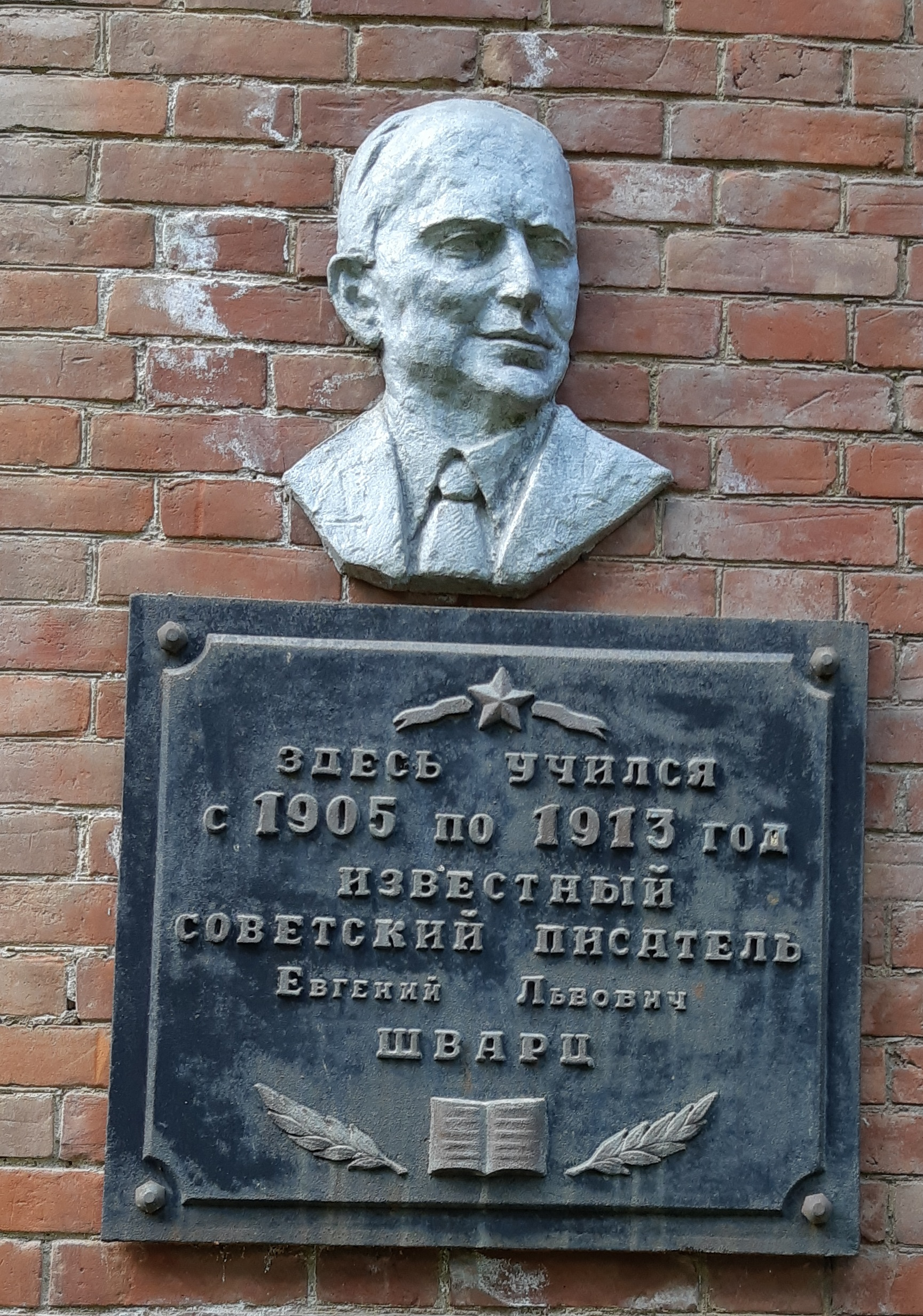 Реальное училище (гимназия женская): улица Пушкина, 173, Майкоп, Адыгея